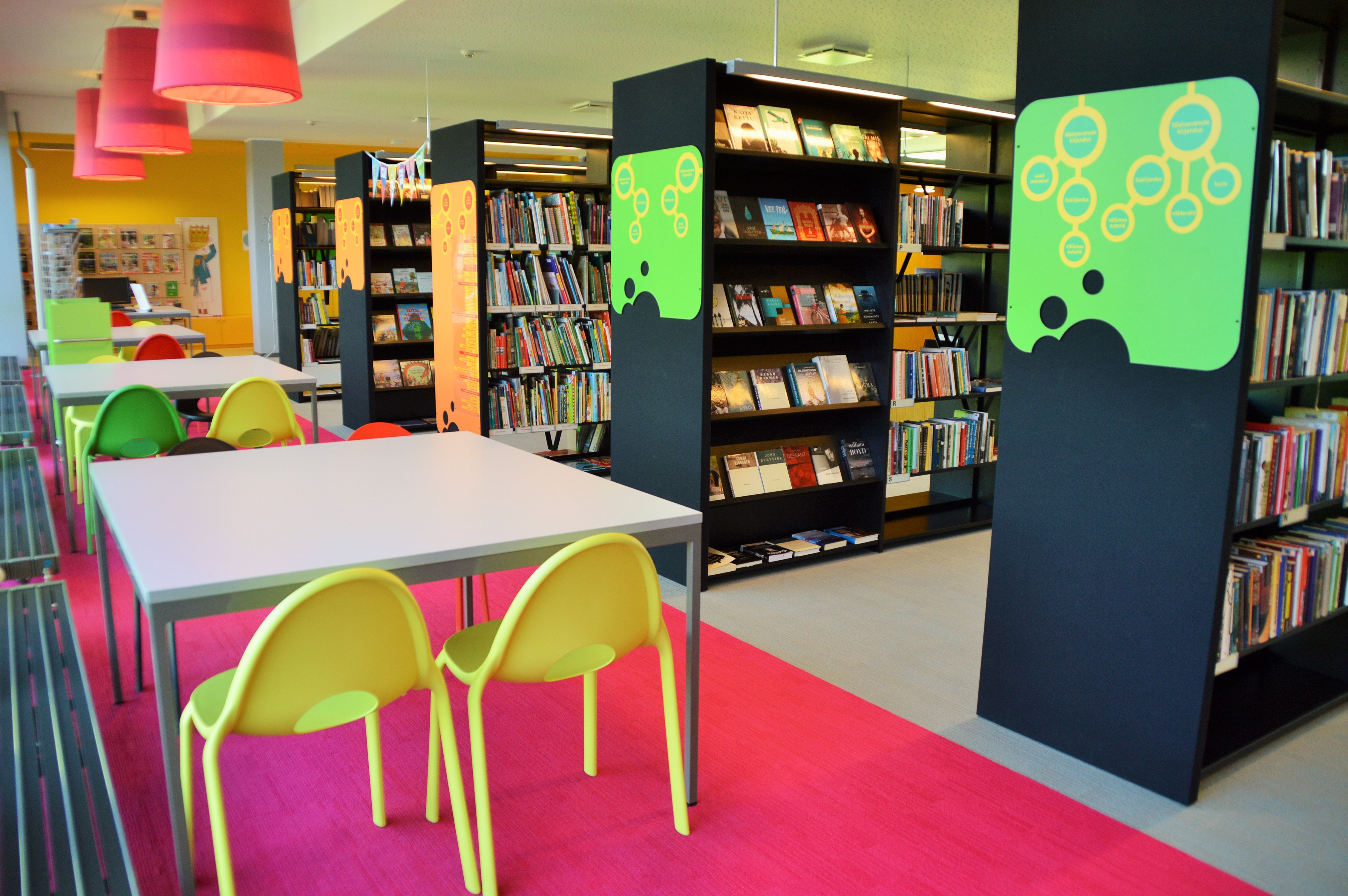 Randvere Raamatukogu sisevaade